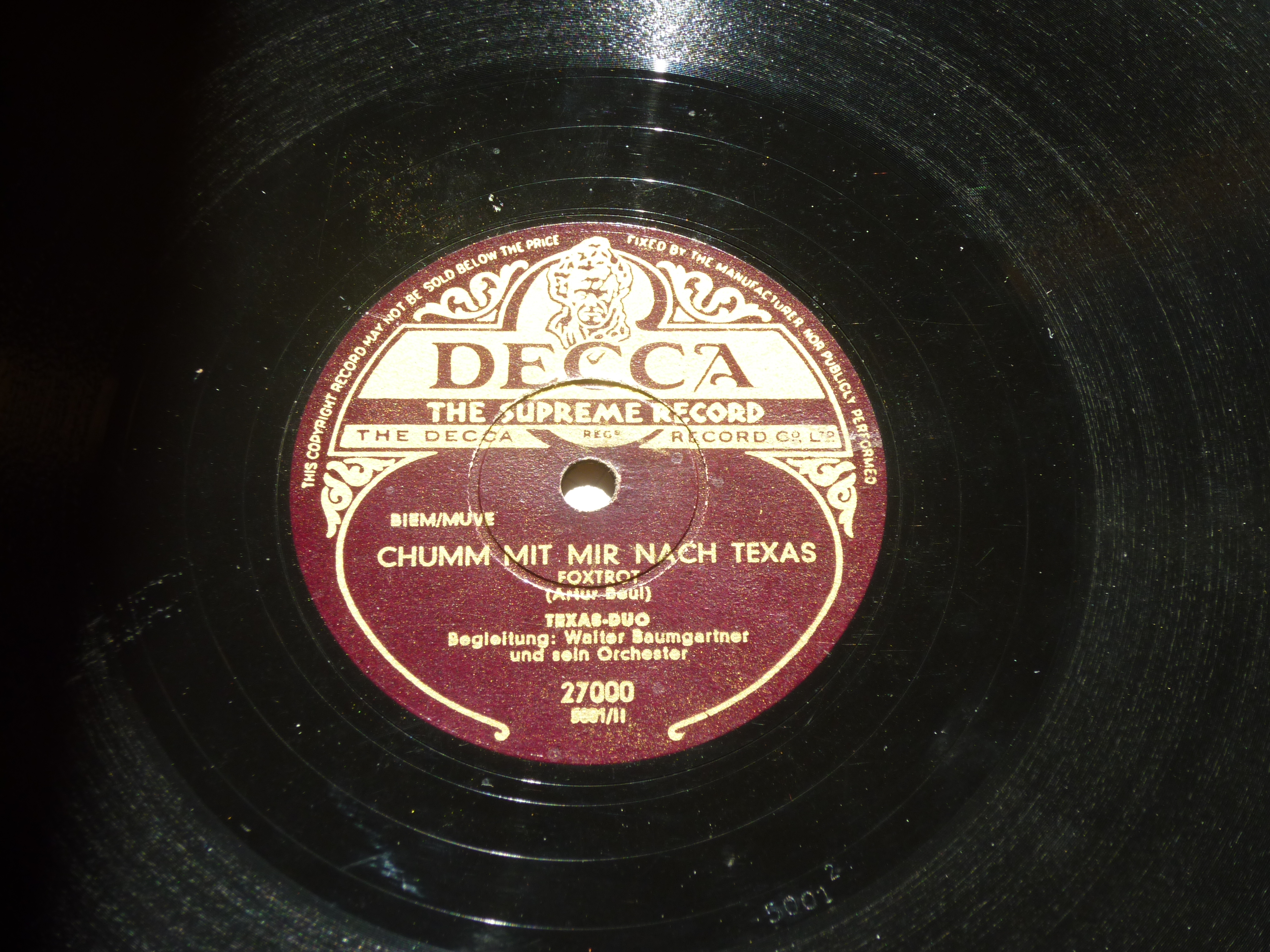 Aufnahme des Texas-Duo von Artur Beul, 1946